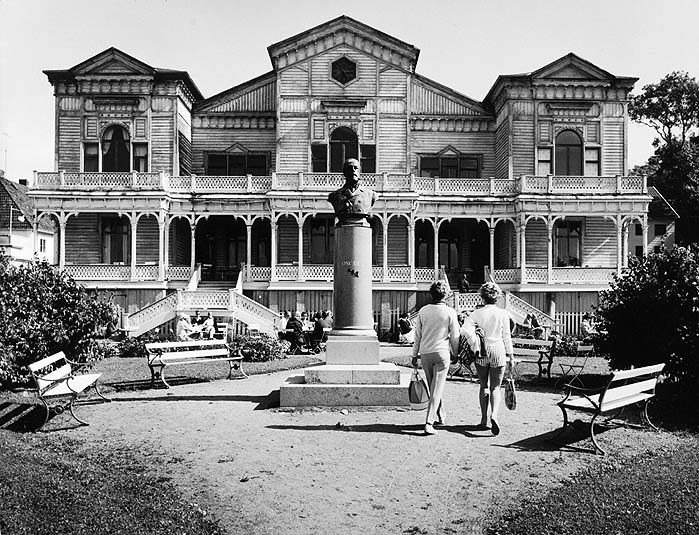 Societetshuset nere vid Fredriksborg. (Marstrand 50:1). Byggnaden uppfördes 1886 efter ritningar av Adrian Peterson, och ligger belägen på Kungsplanen 1. Statyn framför byggnaden är en brons-byst föreställande Oscar II (Marstrand 50:2). Motiv: Societetshuset Nyckelord: Byggnadsminnen, Riksintressen Kategori: Societetshus Societetshuset nere vid Fredriksborg. (Marstrand 50:1). Byggnaden uppfördes 1886 efter ritningar av Adrian Peterson, och ligger belägen på Kungsplanen 1. Statyn framför byggnaden är en brons-byst föreställande Oscar II (Marstrand 50:2).